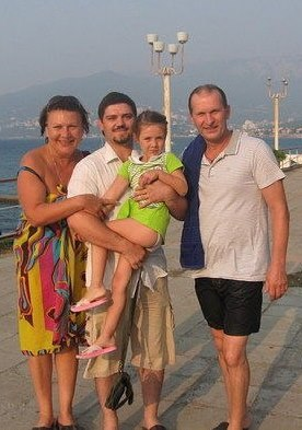 Крым. Съемки 4 сезона.